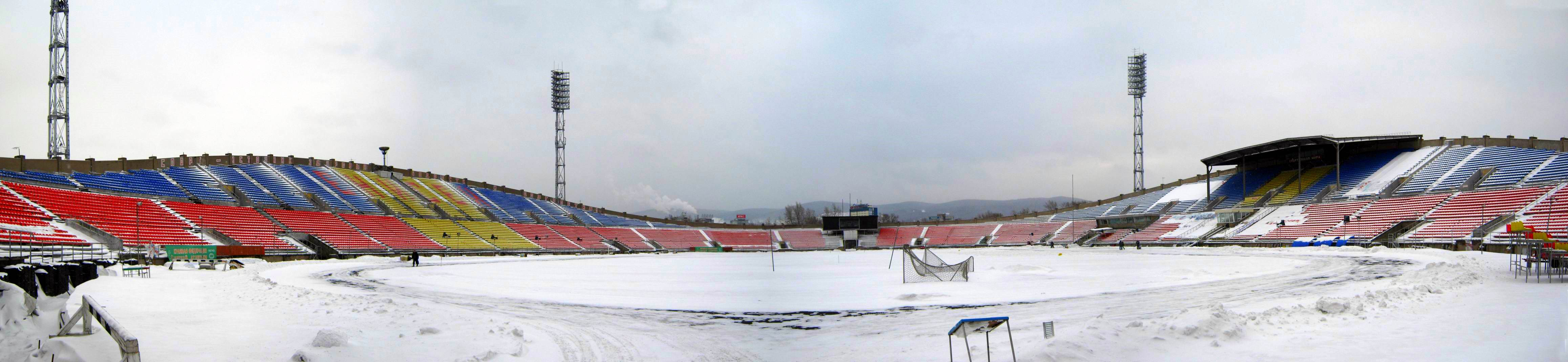 Зимний стадион.